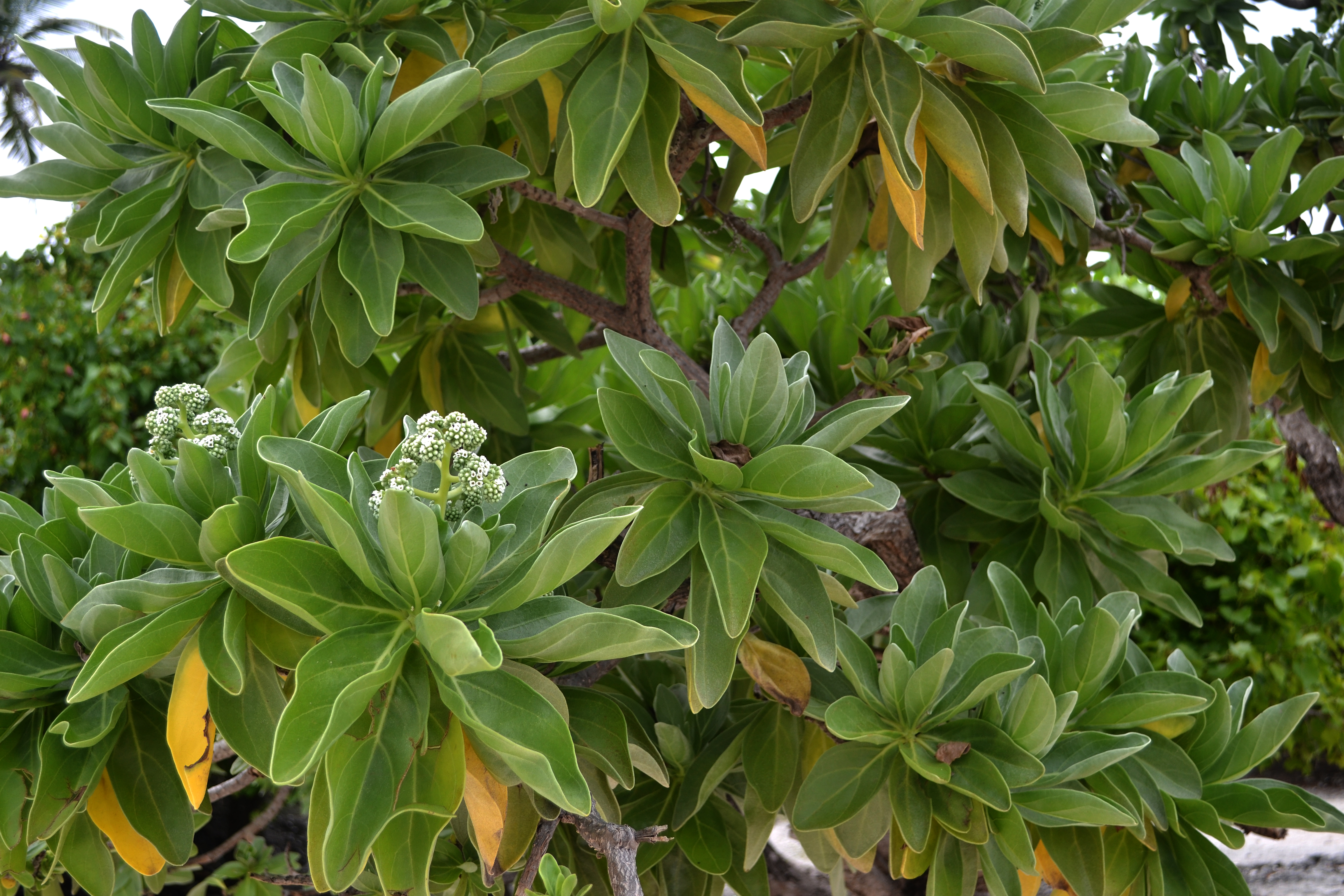 കടല്‍ത്തീരങ്ങളില്‍, ദ്വീപ്‌ സമൂഹങ്ങളില്‍ കാണപ്പടുന്ന ഒരു വൃക്ഷം.